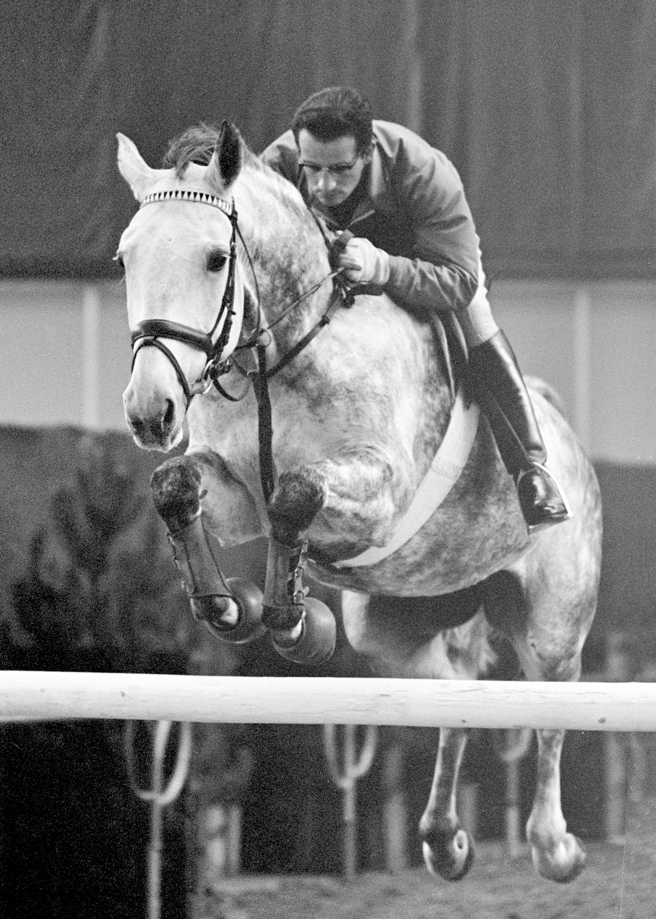 Juming Amsterdam in de RAI te Amsterdam. Duits kampioen Hans Gunther Winkl in aktie op Scheila